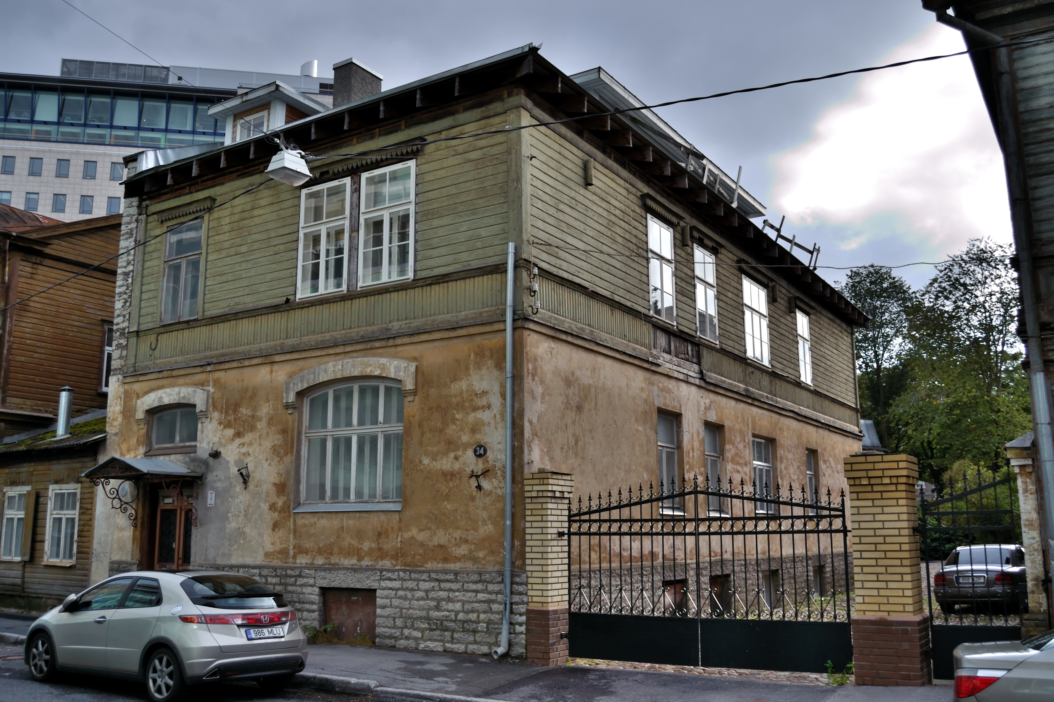 Tallinn, elamu Tatari 34